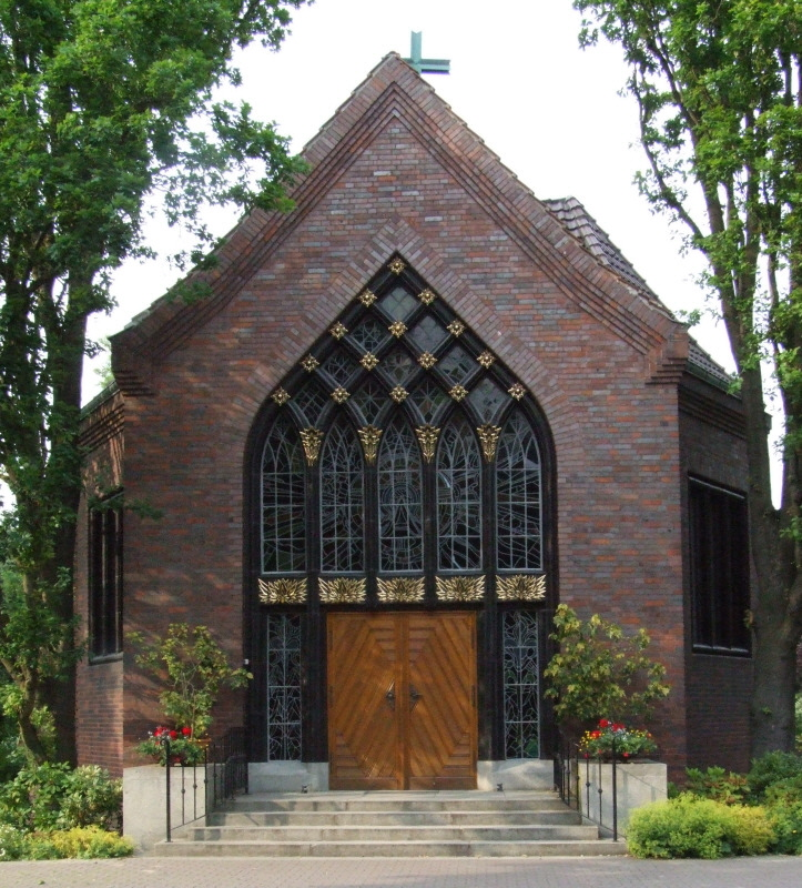 Die Kapelle auf dem evangelischen Gemeindefriedhof in Berlin-Marienfelde Architekt: Bruno Möhring Baujahr: 1927 Fotograf: Harald Rossa Datum: Juni 2006